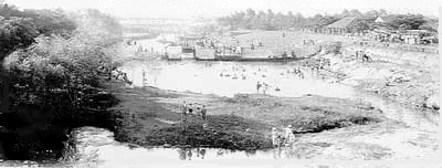 Balneario Río Alegre, Río Reconquista, límite de los Partidos de Moreno y Merlo, Provincia de Buenso Aires, primera mitad del siglo 19.